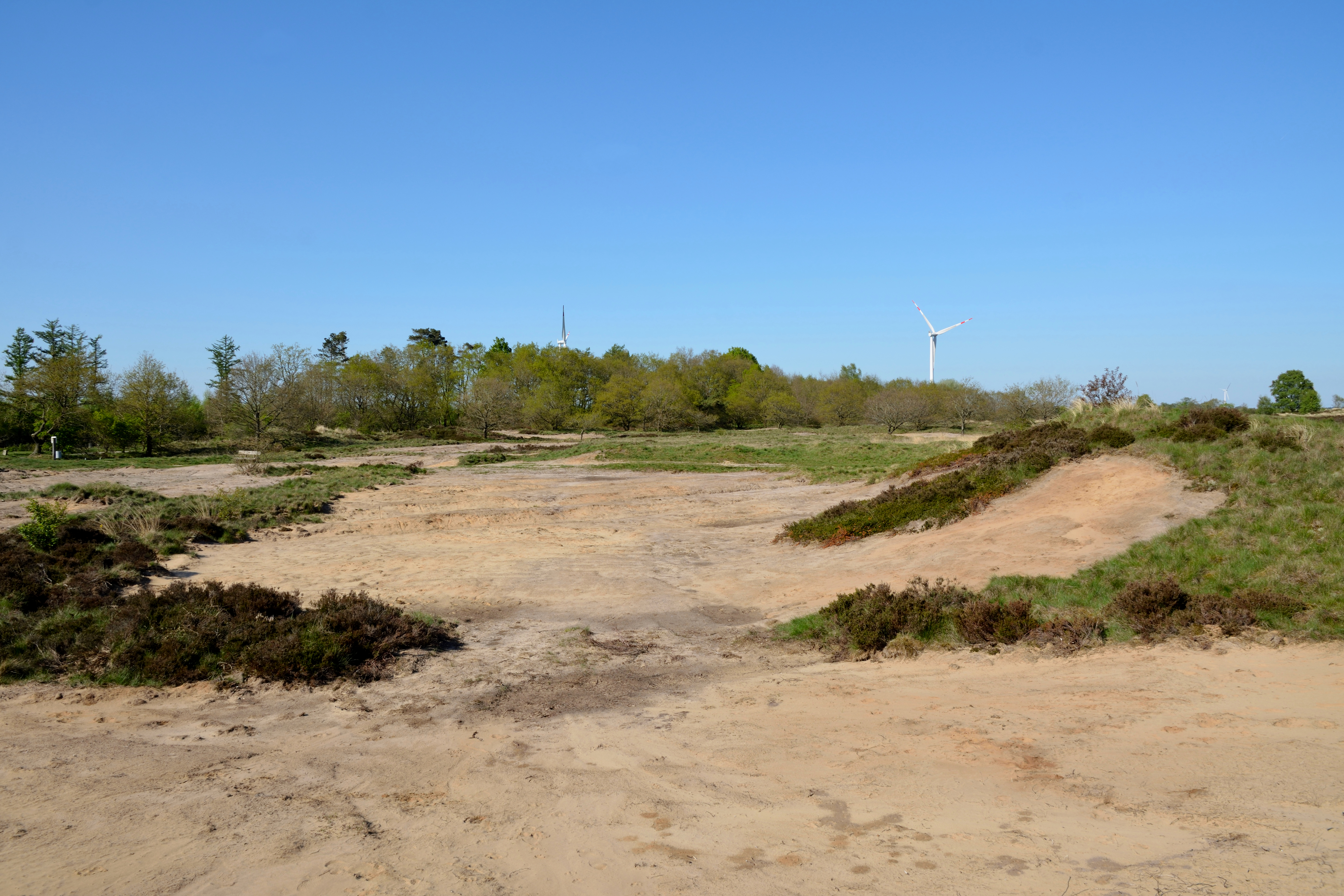 Impressionen aus dem Naturschutzgebiet "Süderlügumer Binnendünen" in Süderlügum